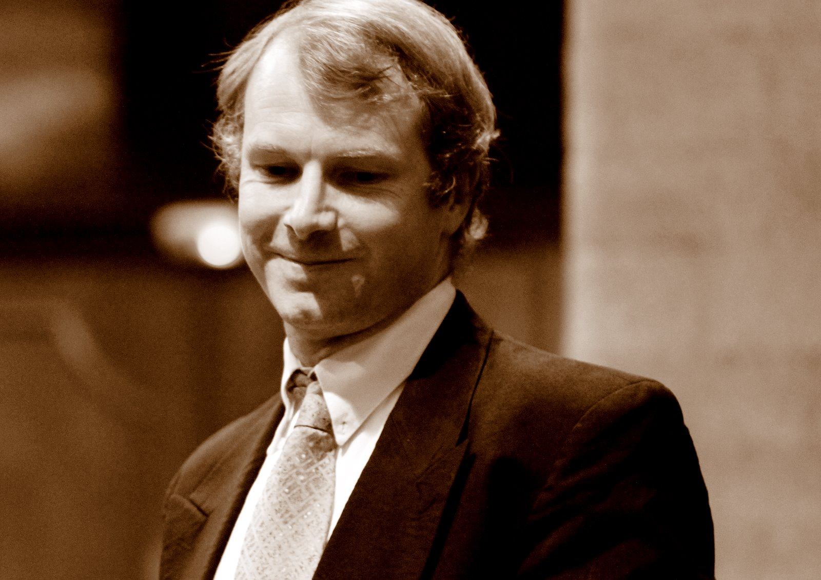 Photo de Francis Jacob après un concert à Nice